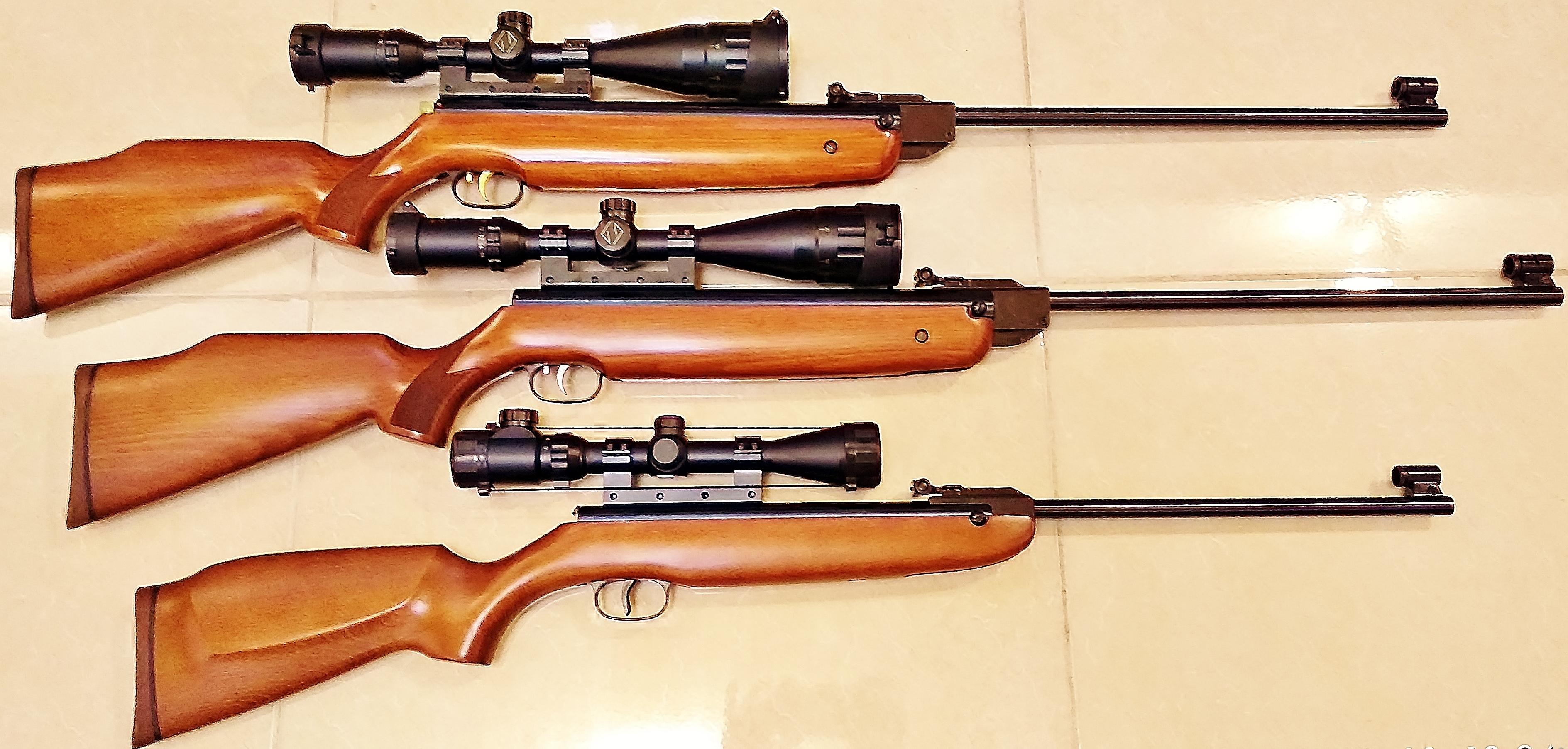 سه قبضه تفنگ بادی فنر پیستون با مکانیزم کمر شکن